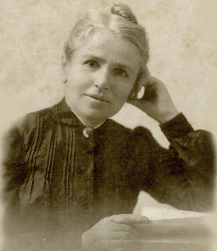 Maria Rennotte